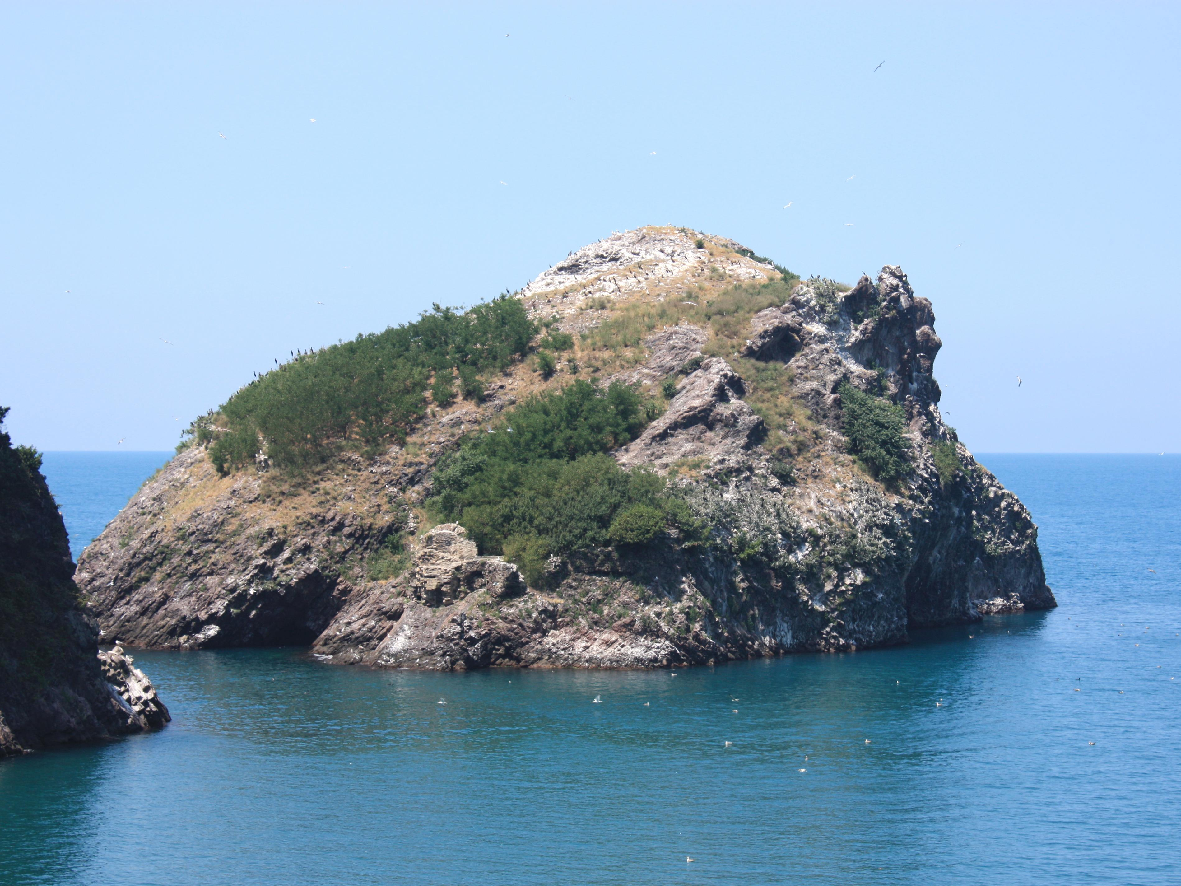 Ordu ilinin Perşembe ilçesine bağlı ada.